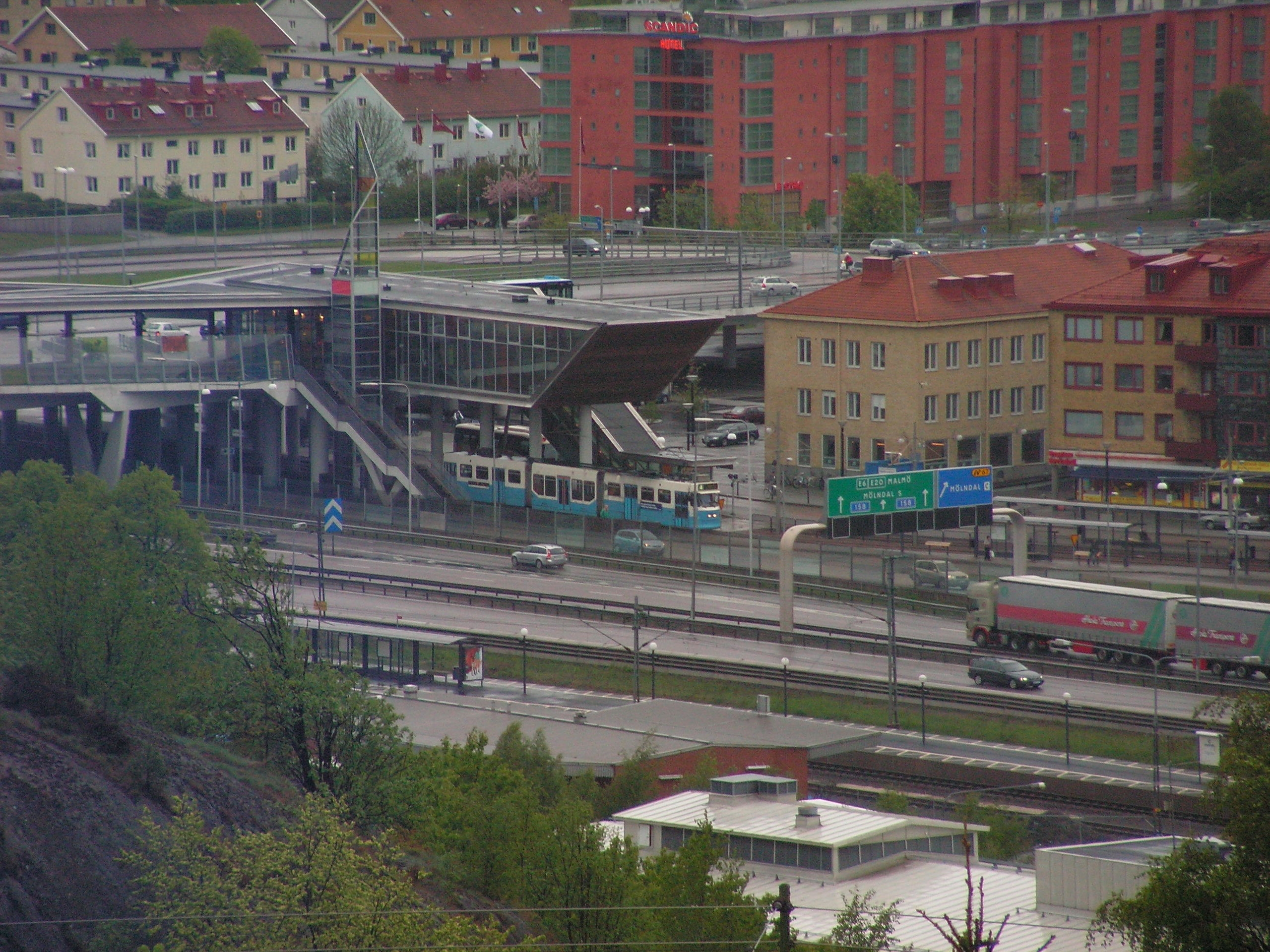 Jag har tagit bilden från balkongen.Stefan.lila 19 maj 2006 kl.13.44 (CEST)